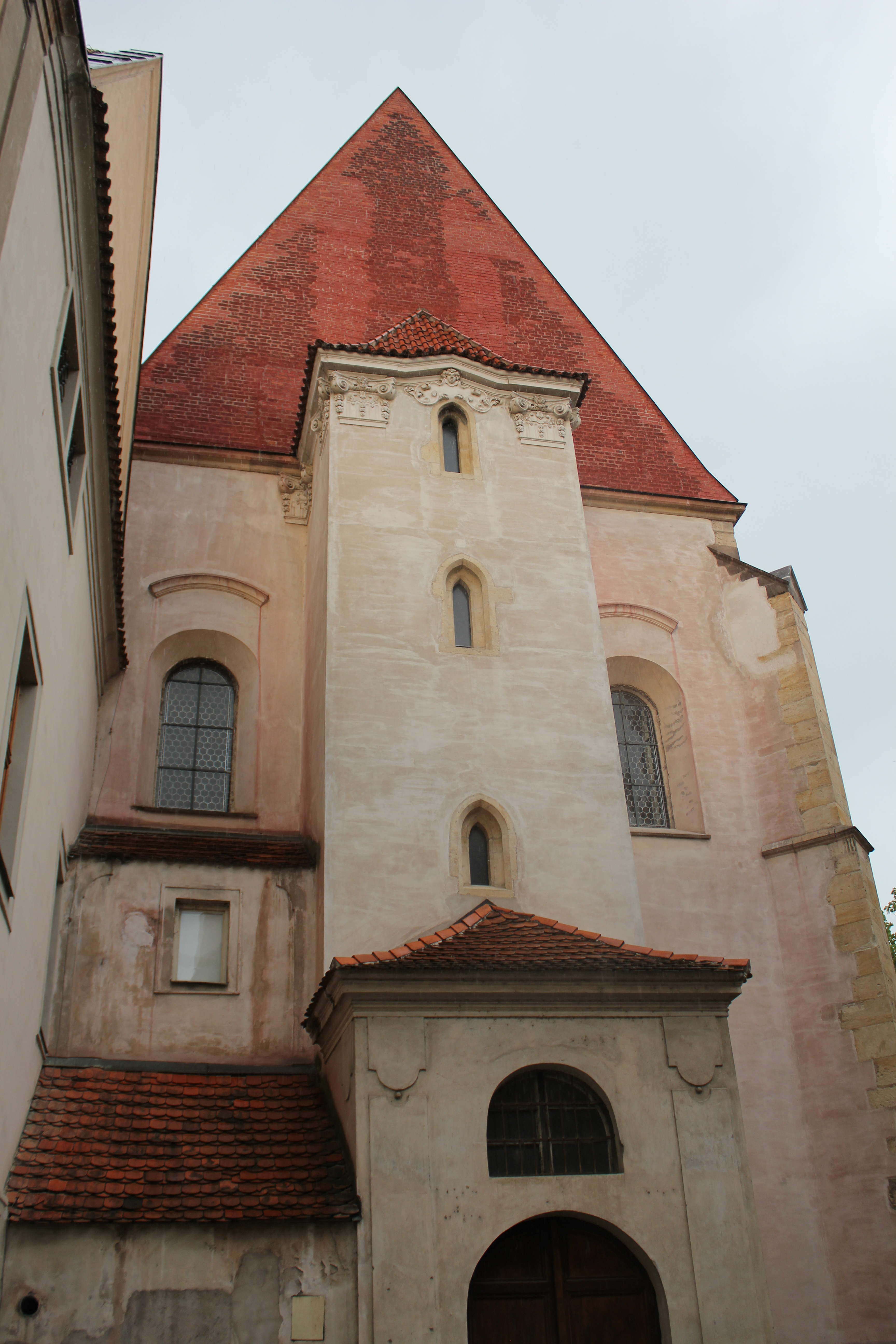 ukjent kirke i gamlebyen rosa